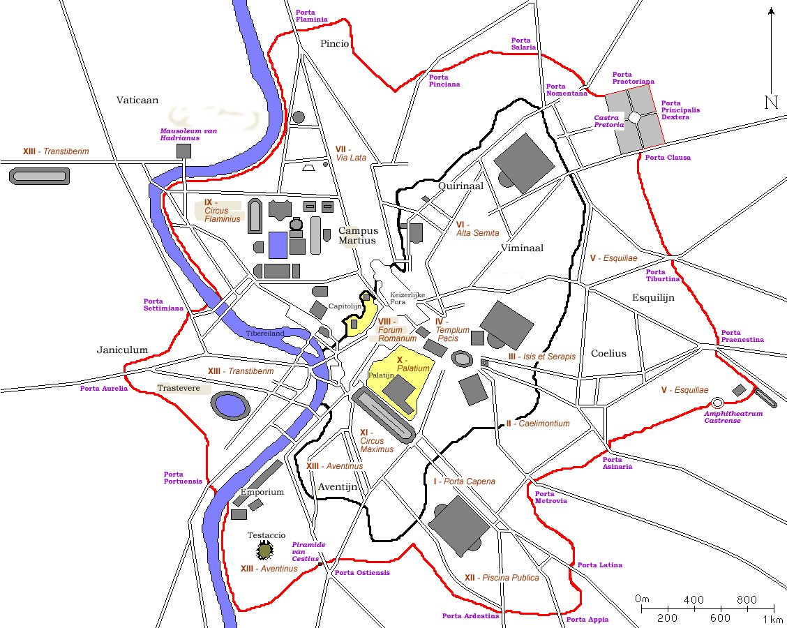 Kaart van antiek Rome waarop de Aureliaanse Muur is uitgelicht. Kaart is afkomstig van FR:wiki en door mij naar een Nederlandse versie bewerkt. Auteurs: nl::fr:User:ColdEel en Gebruiker:Joris